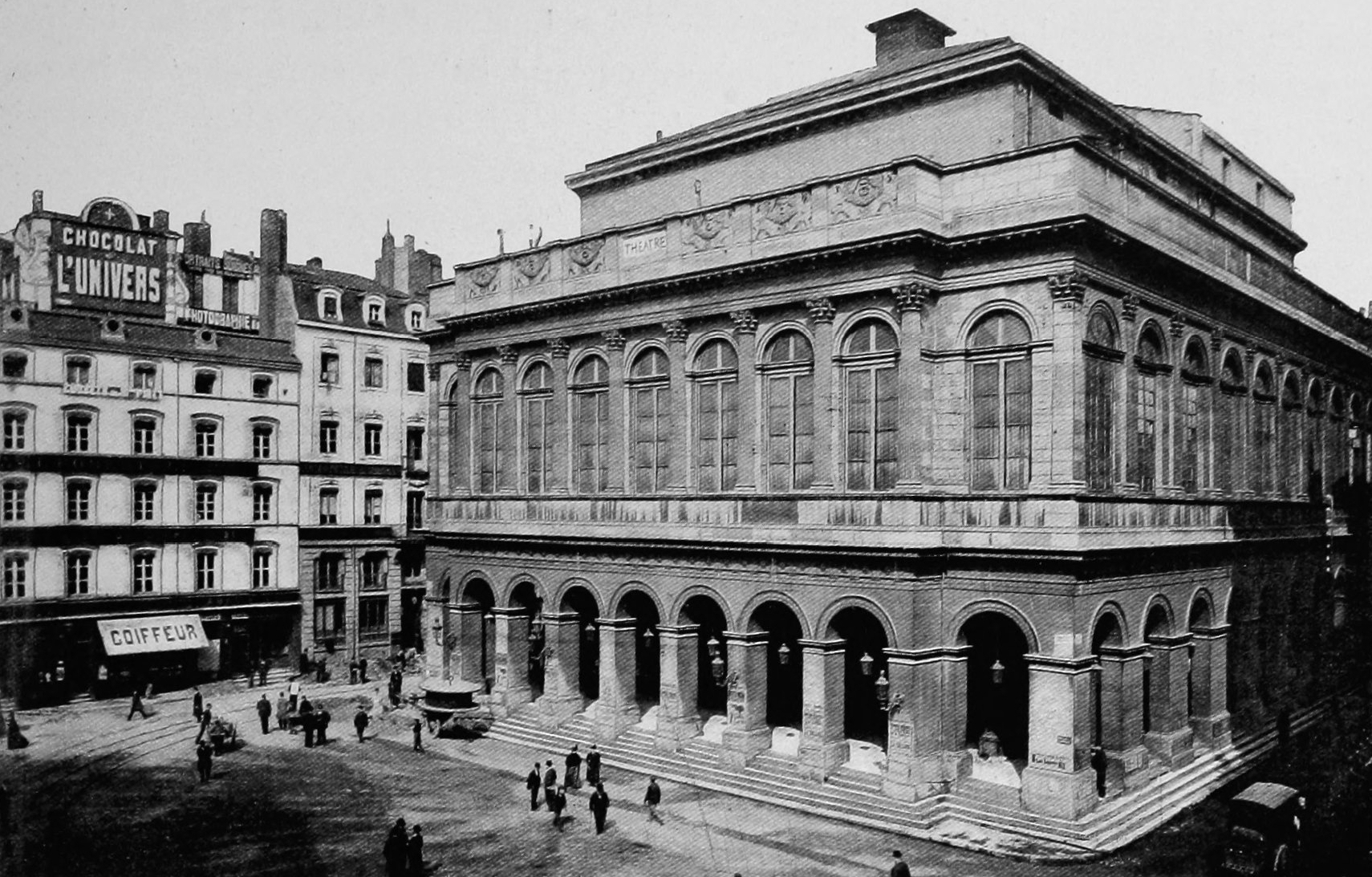 L'Opéra de Lyon, Antoine-Marie Chenavard architecte. Dictionnaire illustré des communes du département du Rhône. Tome 2 / par MM. E. de Rolland et D. Clouzet.